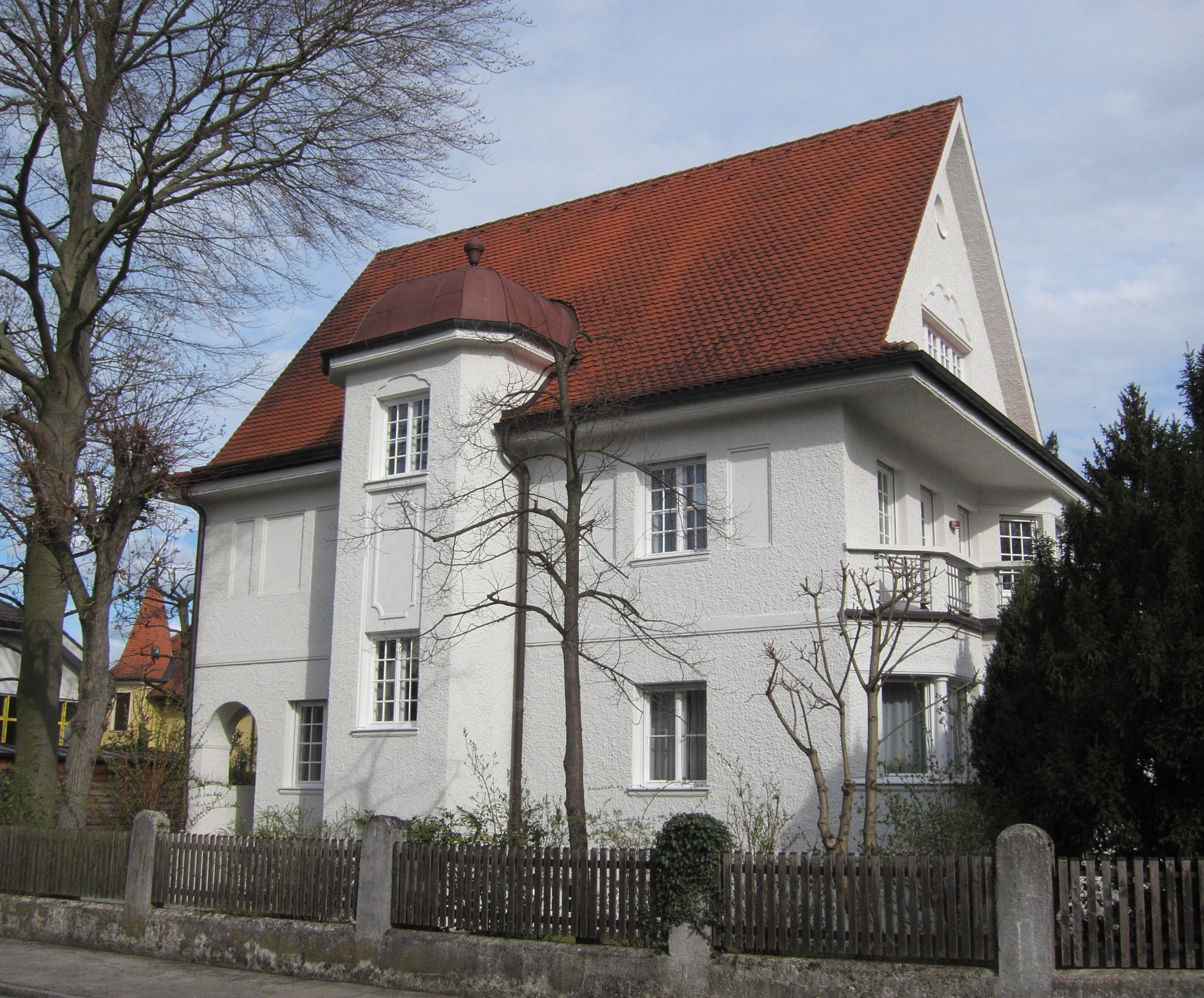 Dachstraße 44.; Villa, Spätjugendstil, 1914 von den Gebrüdern Ott.